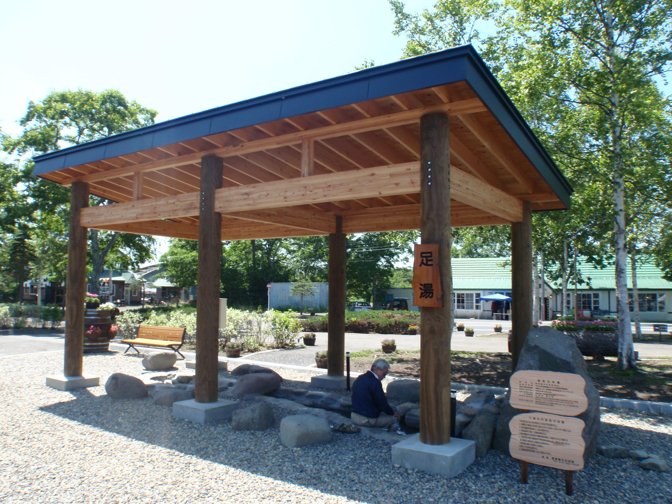 道の駅摩周温泉の足湯